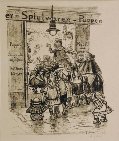 Vor dem Weihnachtsladen